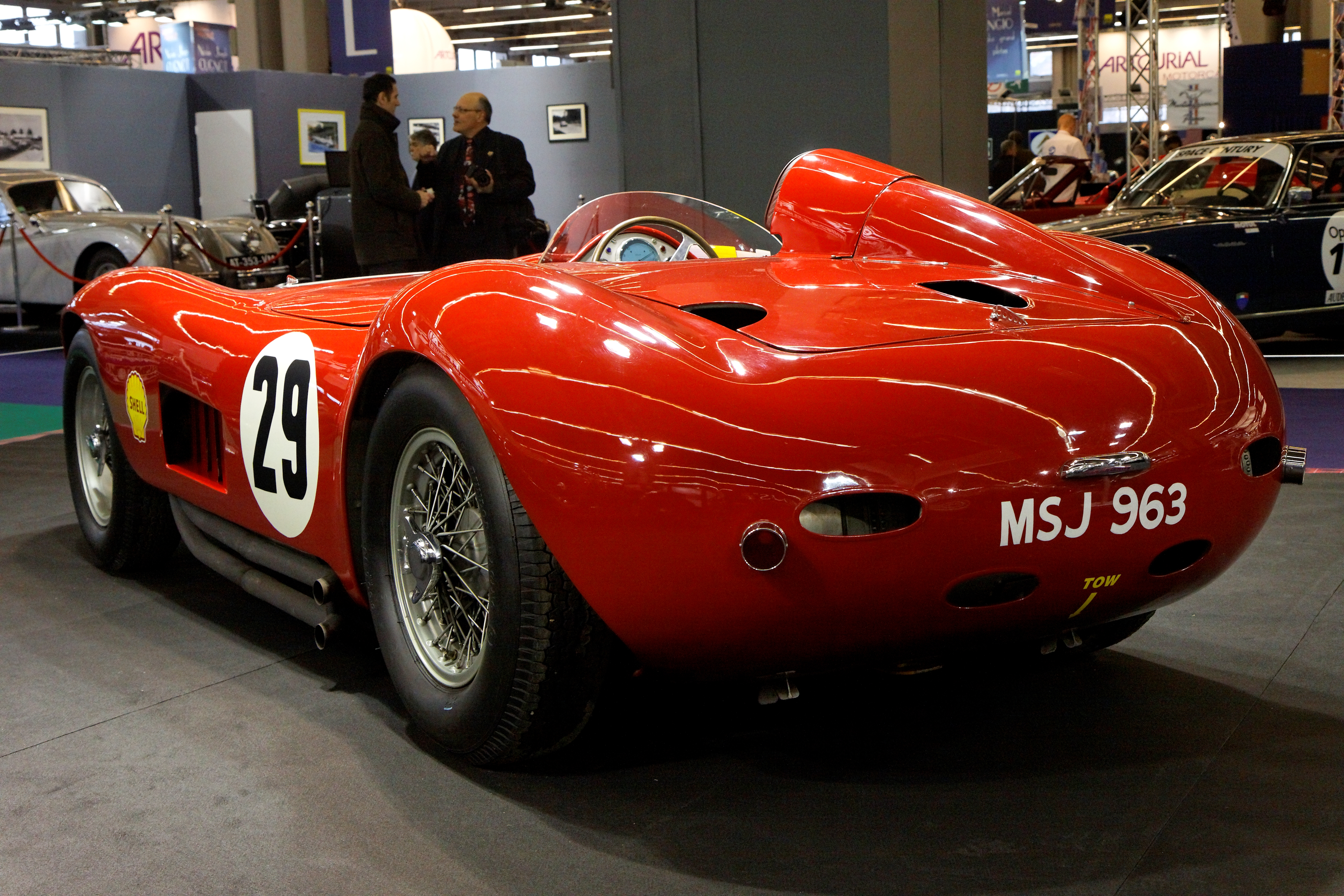 Photographie prise lors du salon rétromobile 2011 à Paris, porte de Versailles.